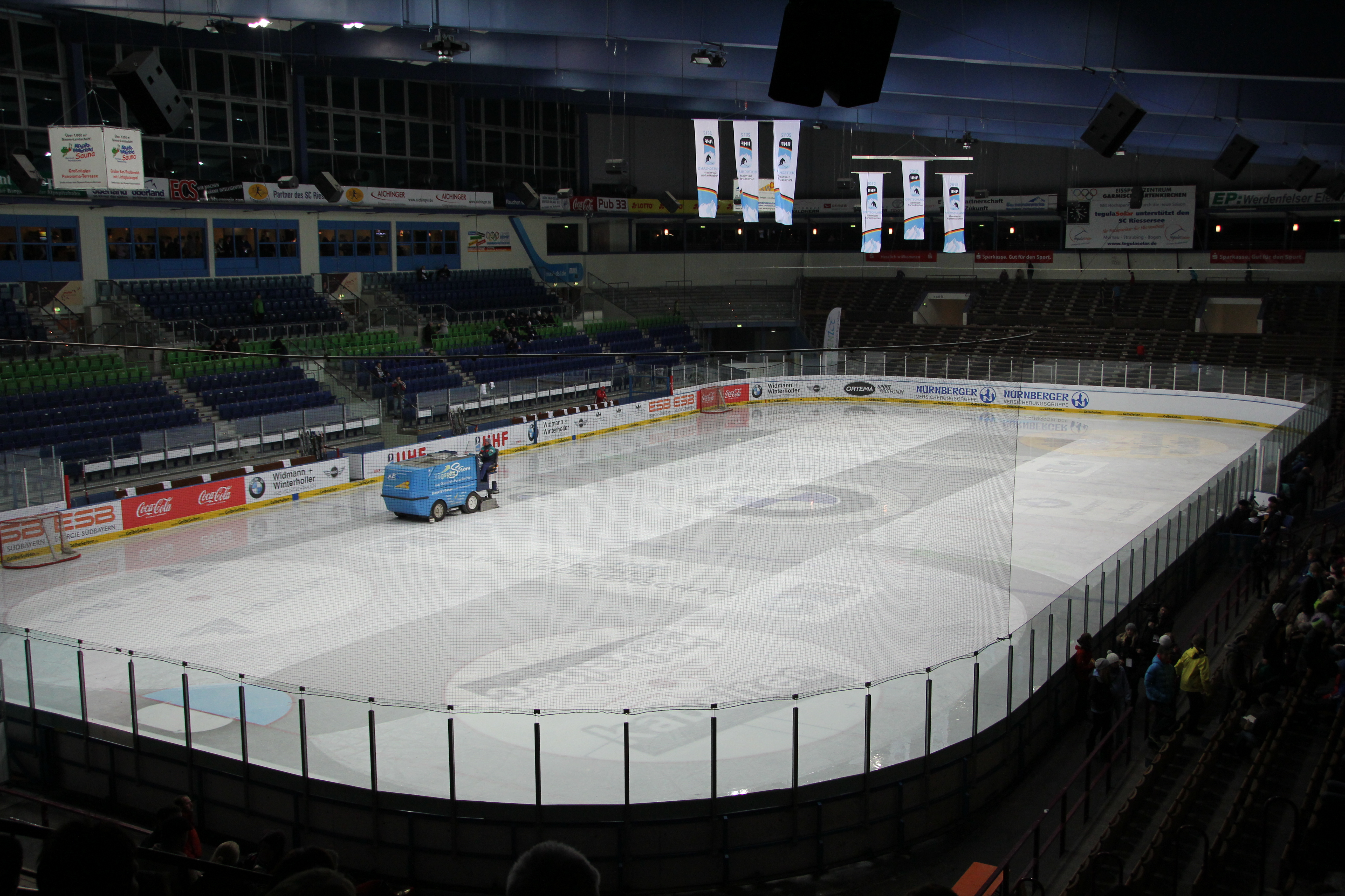 Innenansicht des Olympia Eissport Zentrums Garmisch-Partenkirchen von Nord-Osten nach Süd-Westen.